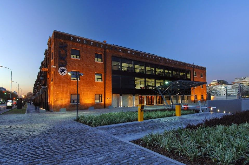 Fotografía con vista del Edificio San José de la Universidad Católica Argentina, Buenos Aires